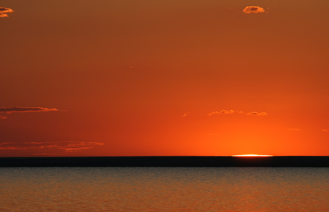 Эльтон, Палласовский район This image is related to the protected area of Russia number 3400342